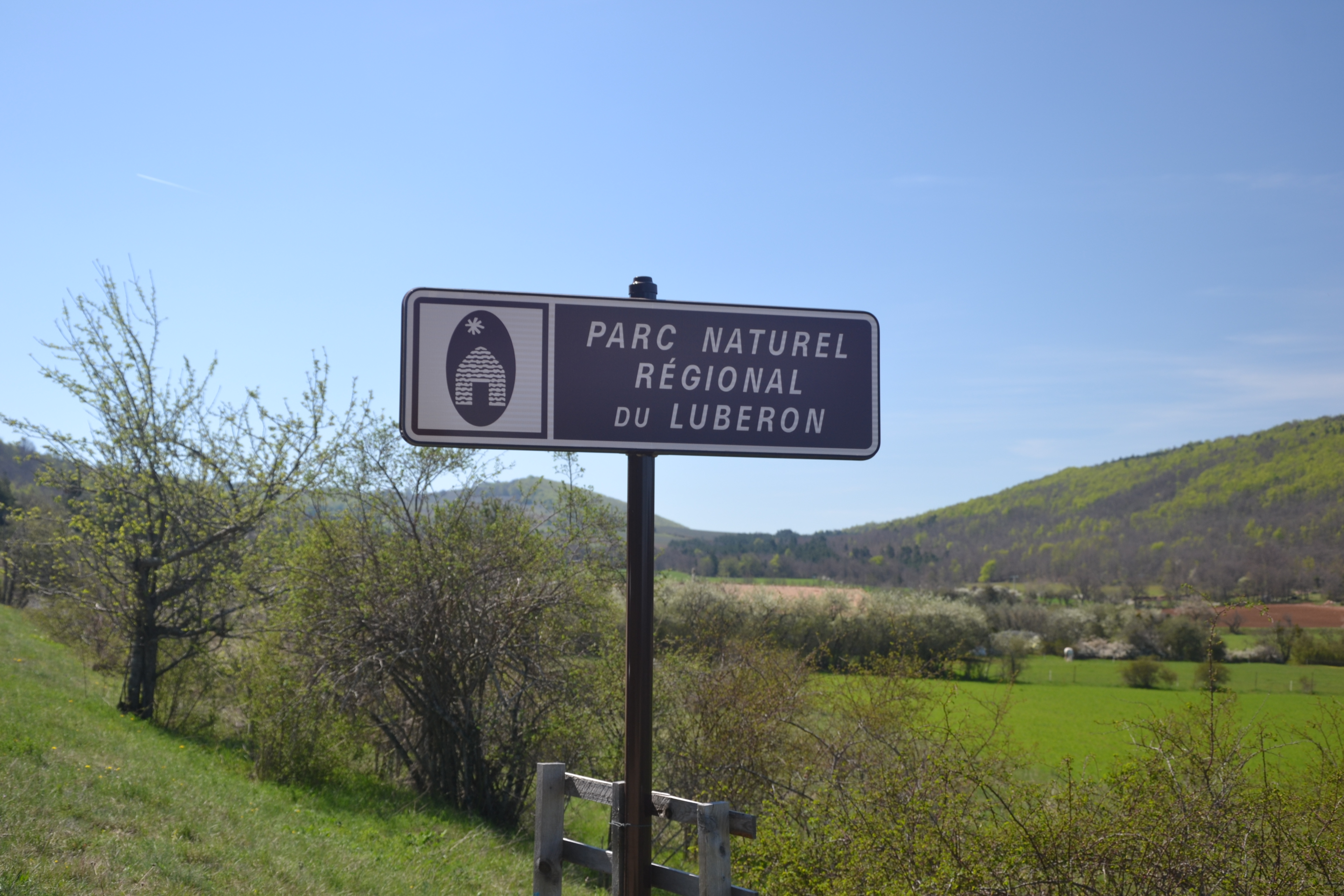 paysage en limite nord du parc naturel du Lubéron, près de Lagarde d'Apt